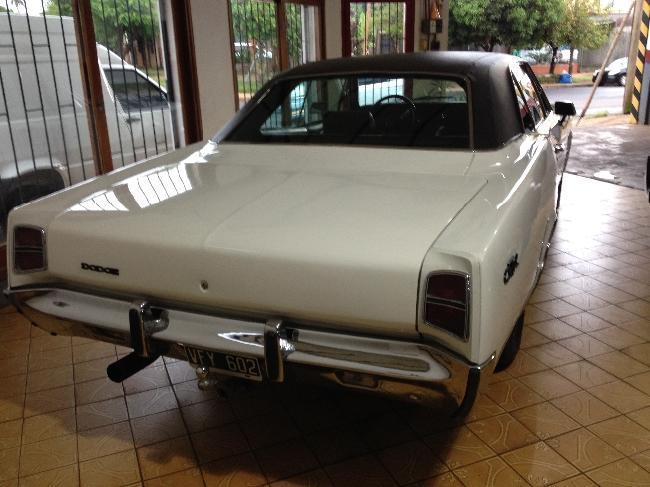 colas